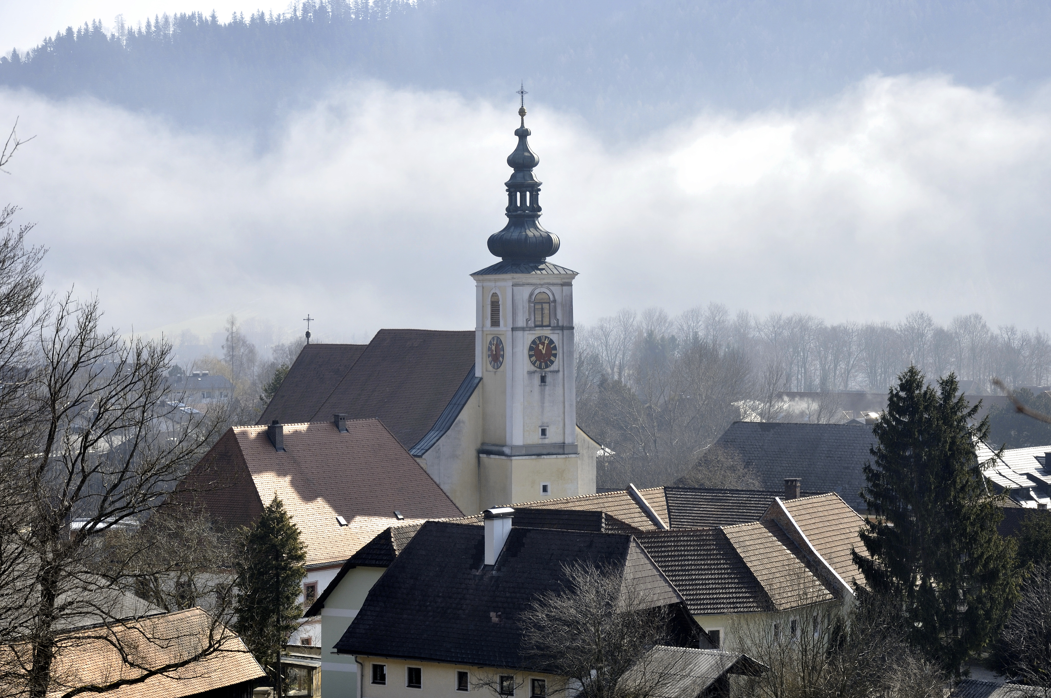 Kath. Pfarrkirche hl. Johannes Evangelist mit Friedhofsfläche